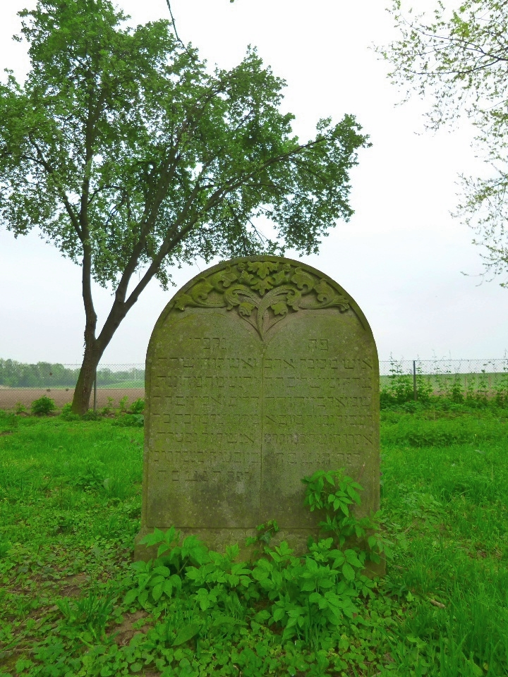 Grab von Caroline (gestorben 1865) und Samuel (gestorben 1866) Löb auf dem Jüdischen Friedhof in Schwarzrheindorf - Der Text in hebräischer Sprache auf dem Grabstein lautet: (rechte Tafelseite) Hier ein geehrter Mann, er liebte Gerechtigkeit und Geradheit, es ist Schmuel Sohn des Jehuda Löb, sein Andenken zum Segen, verschieden am Tag 1, dem Nachfeiertag des Pessachfestes 626 nach kleiner Zählung. Seine Seele sei eingebunden in den Bündel des Lebens (linke Tafelseite) sind begraben und seine aufrechte und liebenswürdige Frau, zugetan den Darbenden und den Bedürftigen, es ist Frau Gelche Tochtes des ehrenwerten Herrn Anschel, sein Andenken zum Segen, verschieden am Tage des heiligen Schabbat, 12. Tewet 626 nach kleiner Zählung. Ihre Seele sei eingebunden in das Bündel des Lebens